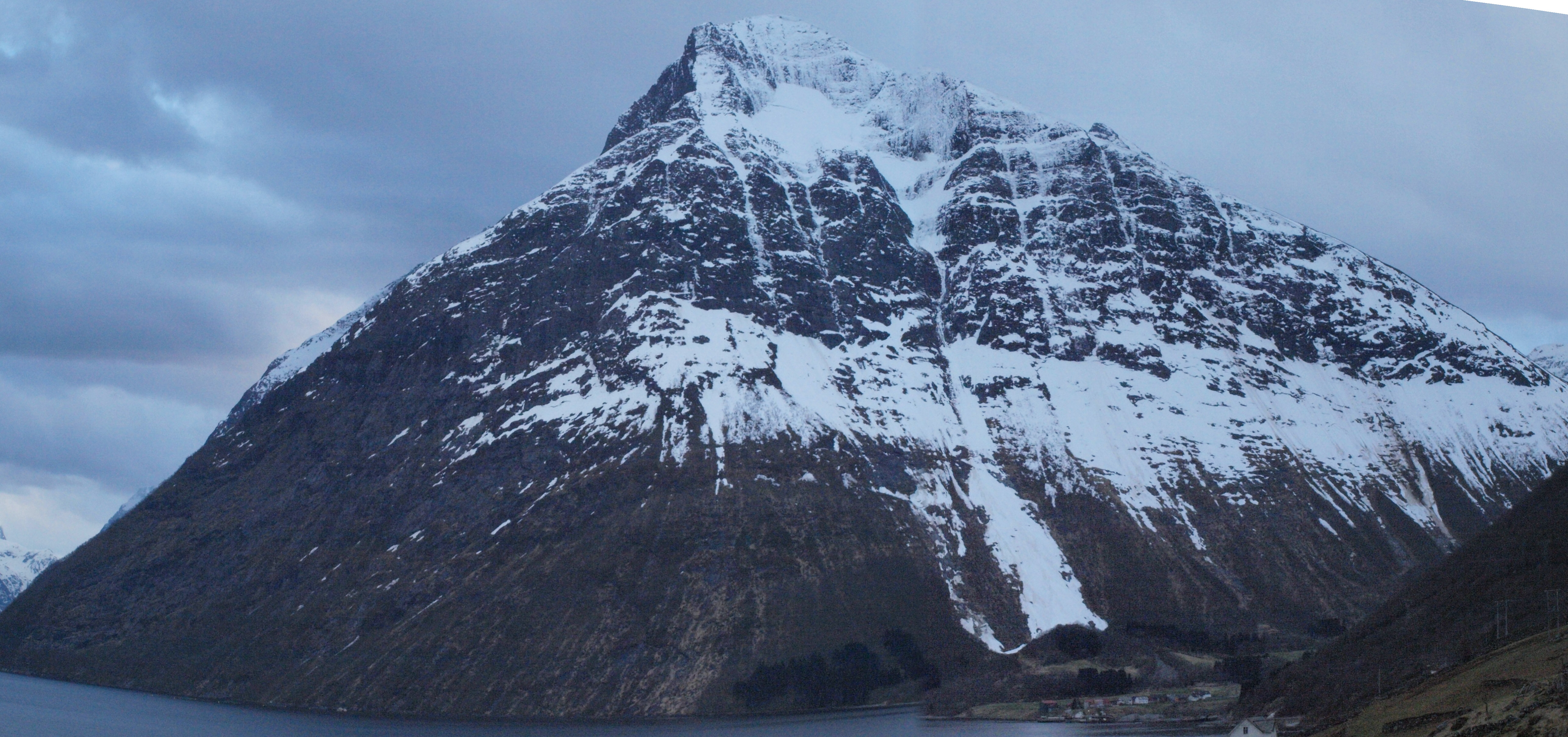 Storehornet (Sølvkallen), Ørsta, Norge